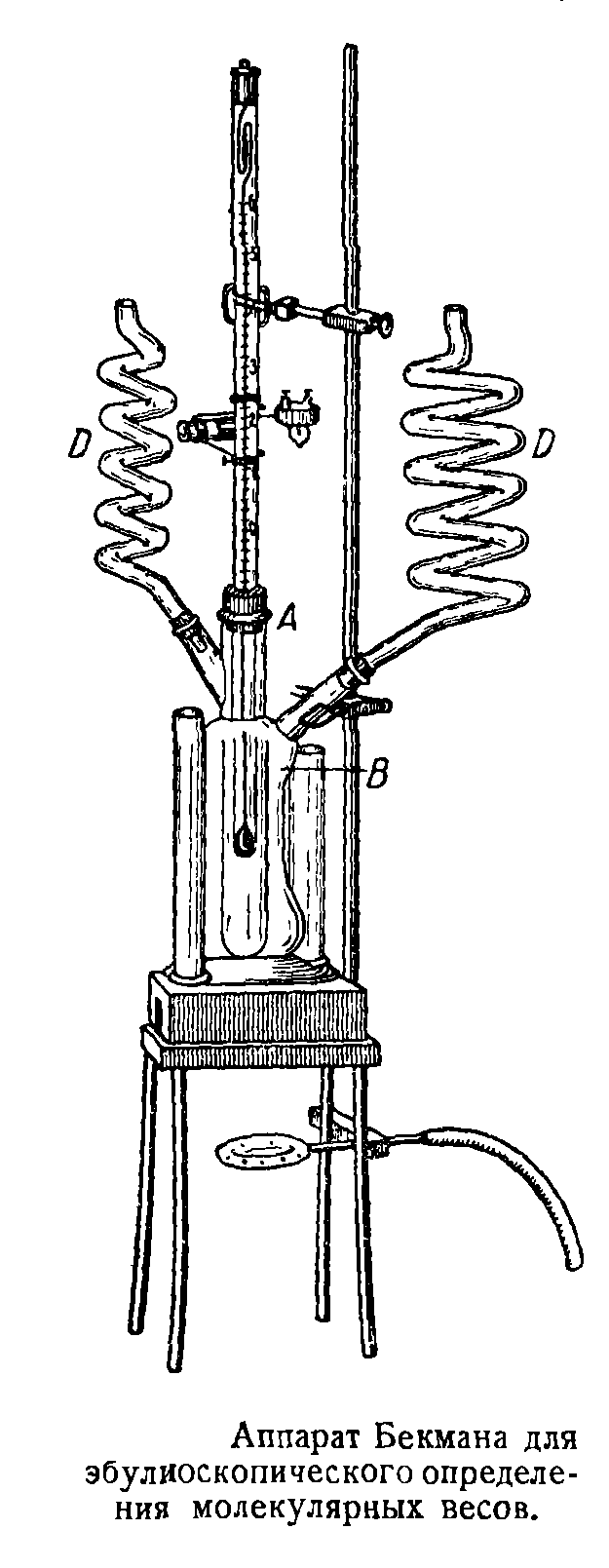 Аппарат Бекмана для эбулиоскопического определения молекулярных весов